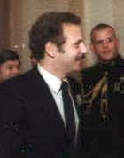 Ken Adelman